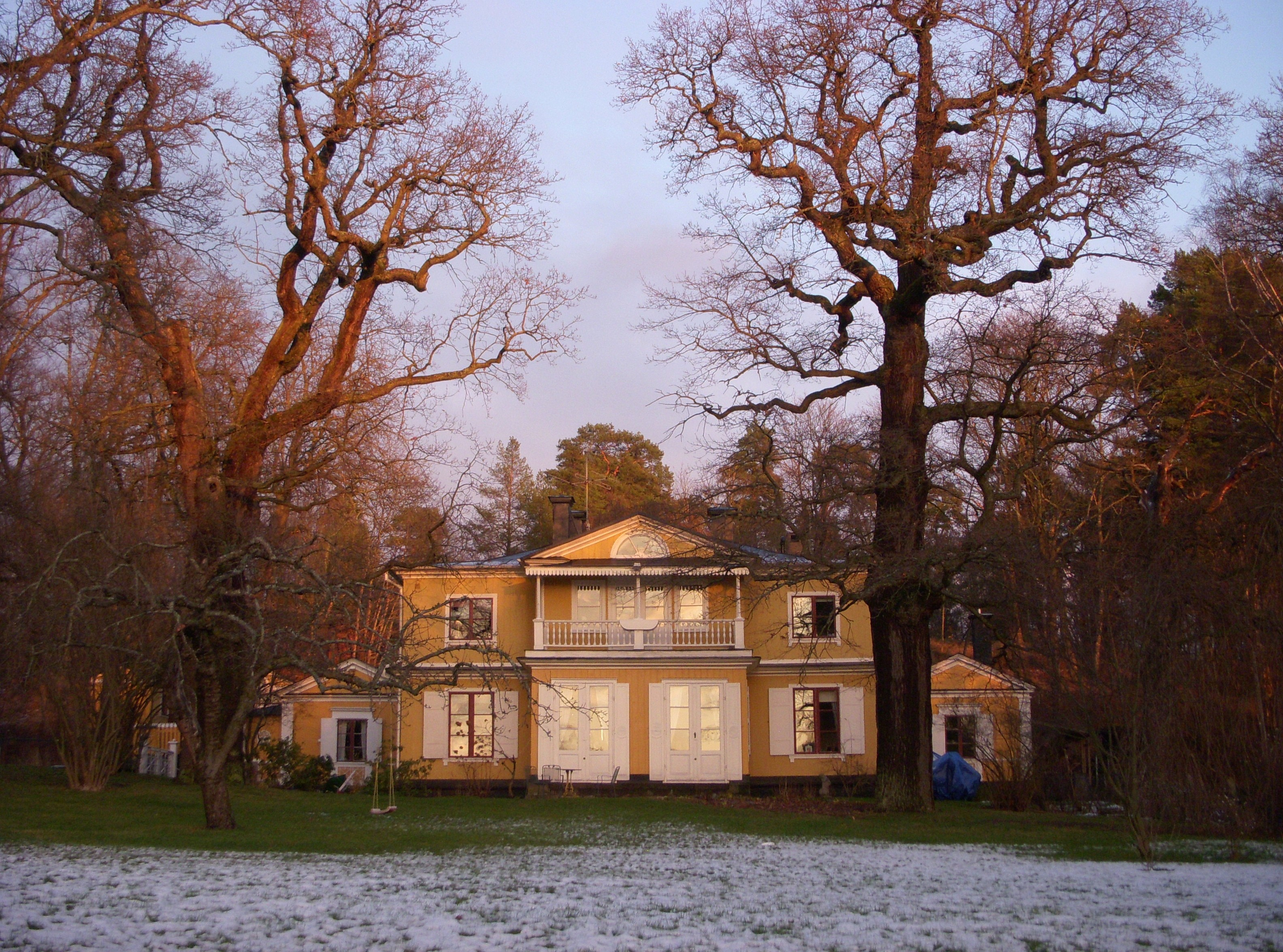 Bergshyddan på Djurgården, fasad mot sydväst